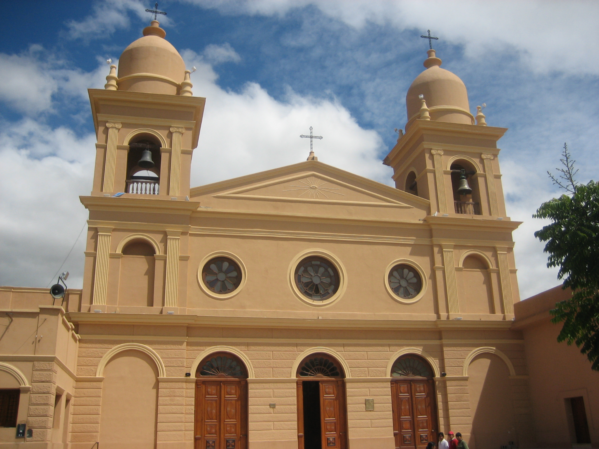 Iglesia Catedral Nuestra Señora del Rosario in Cafayate